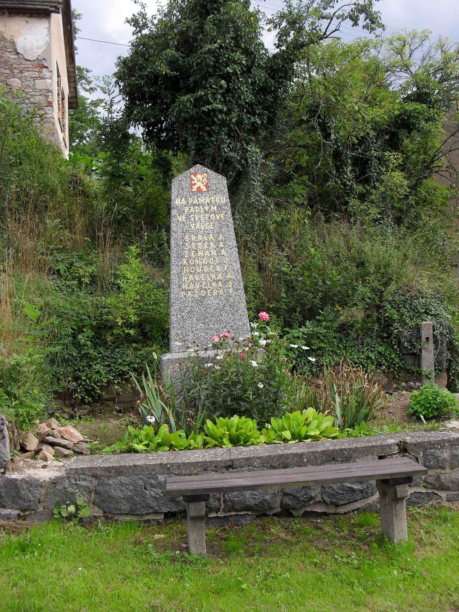 Pomník obětem 1. světové války v Bukové Lhotě (Benešov)